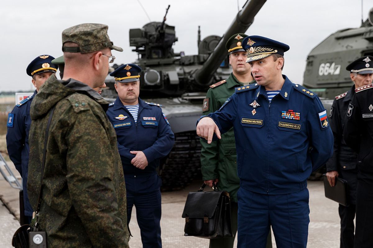 Рабочая поездка заместителя Министра обороны Российской Федерации — руководителя Аппарата Министра обороны Российской Федерации генерал-полковника Юрия Садовенко в войска Южного военного округа